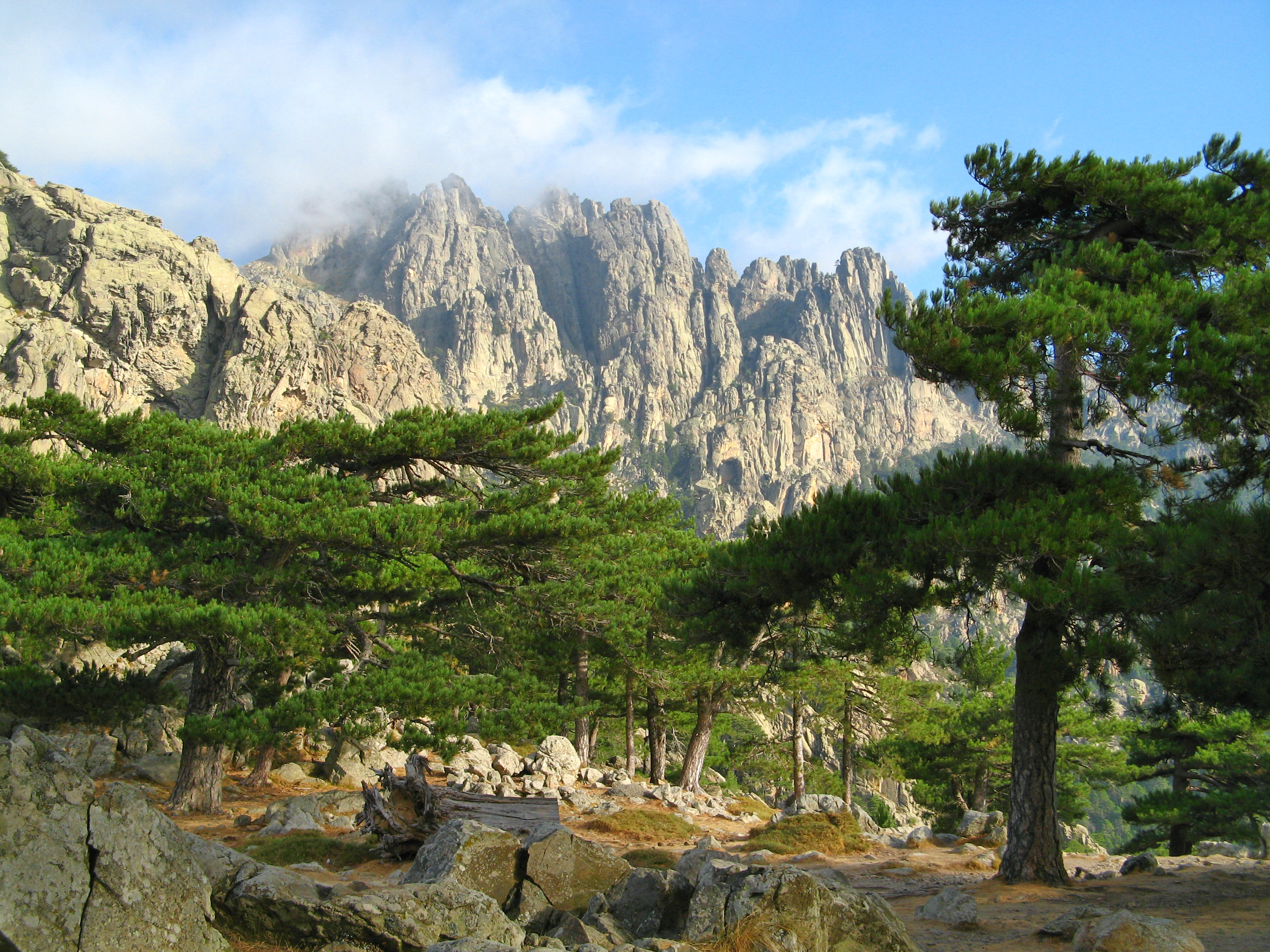 Les Aiguilles de Bavella, vues depuis le Col de Bavella (Corse du Sud)